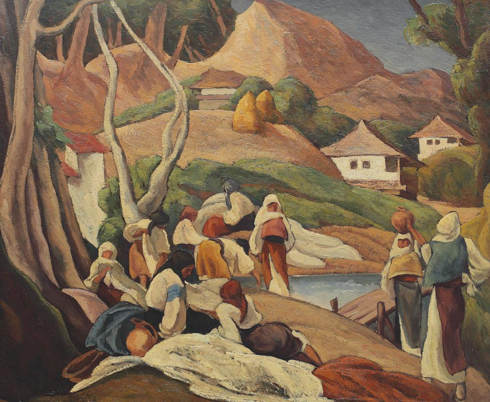 Ion Theodorescu-Sion - Compoziție cu ţărănci la răscruce, ulei pe carton, 48,5 x 59,5 cm, semnat stânga jos, cu negru, Theo Sion.